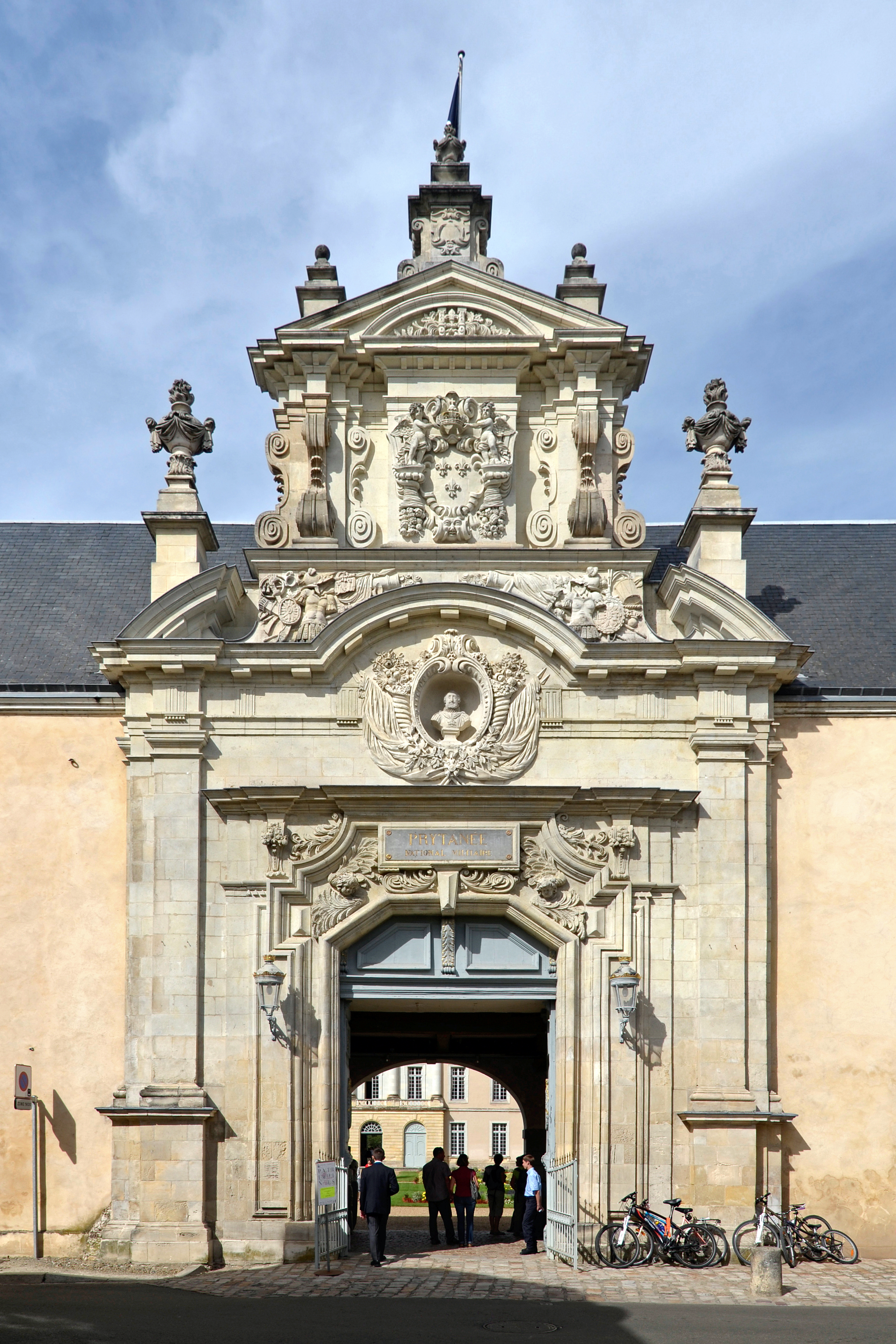 Ancien collège des Jésuites, actuellement Prytanée national militaire - La Flèche (Sarthe)